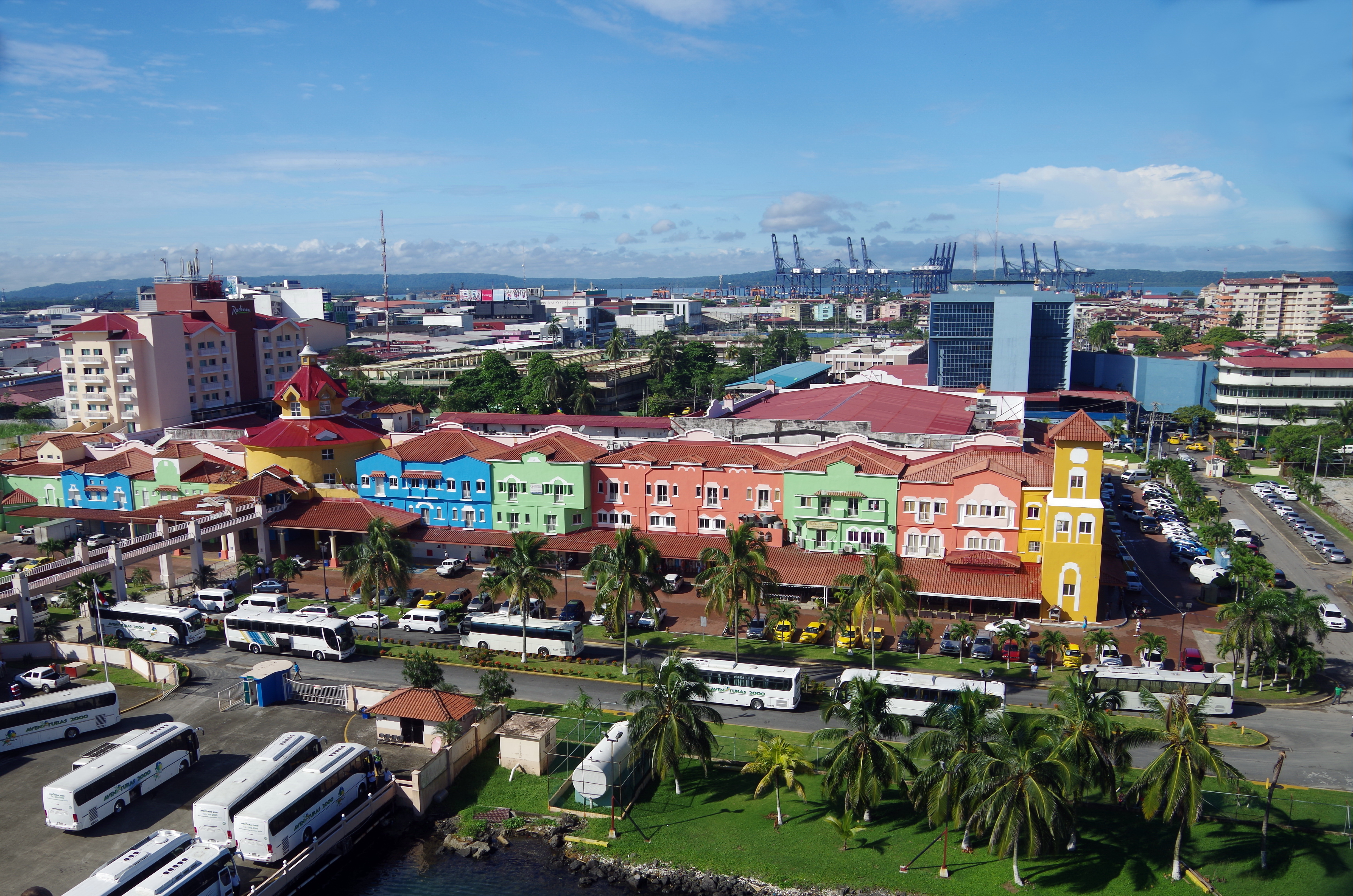 Kreuzfahrtterminal Colon 2000